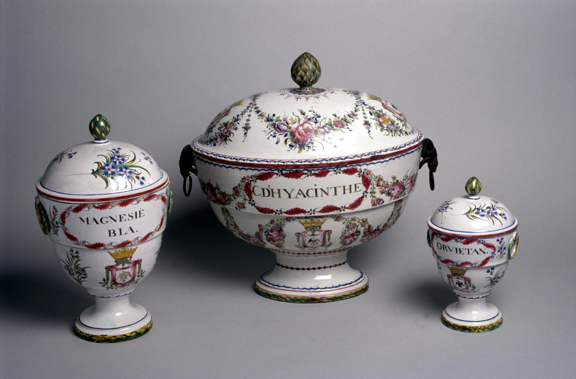 Pots à pharmacie en faïence, de la collection Beaujon du musée de l'AP-HP; atelier Ollivier à Paris